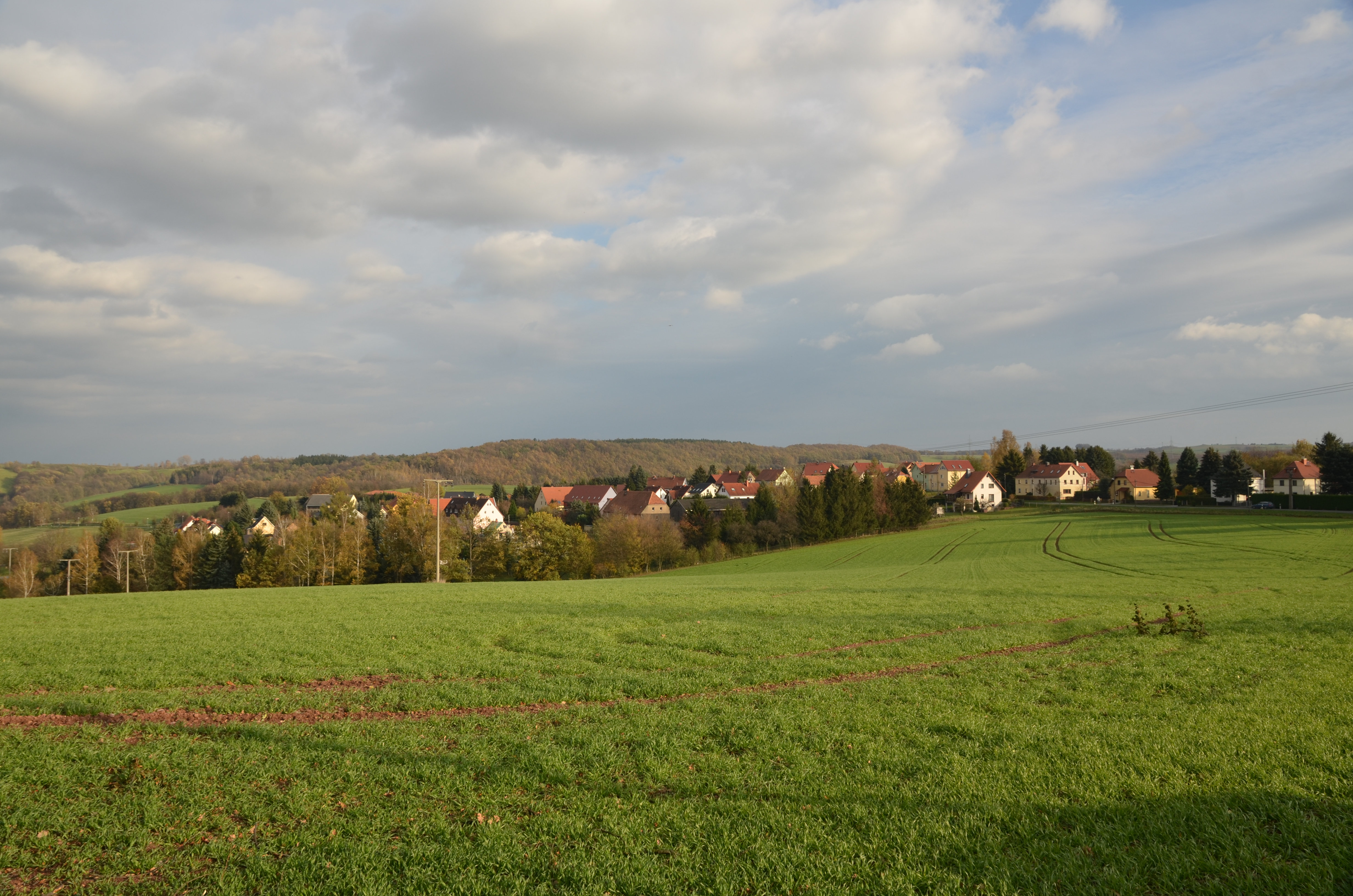 Kautzsch